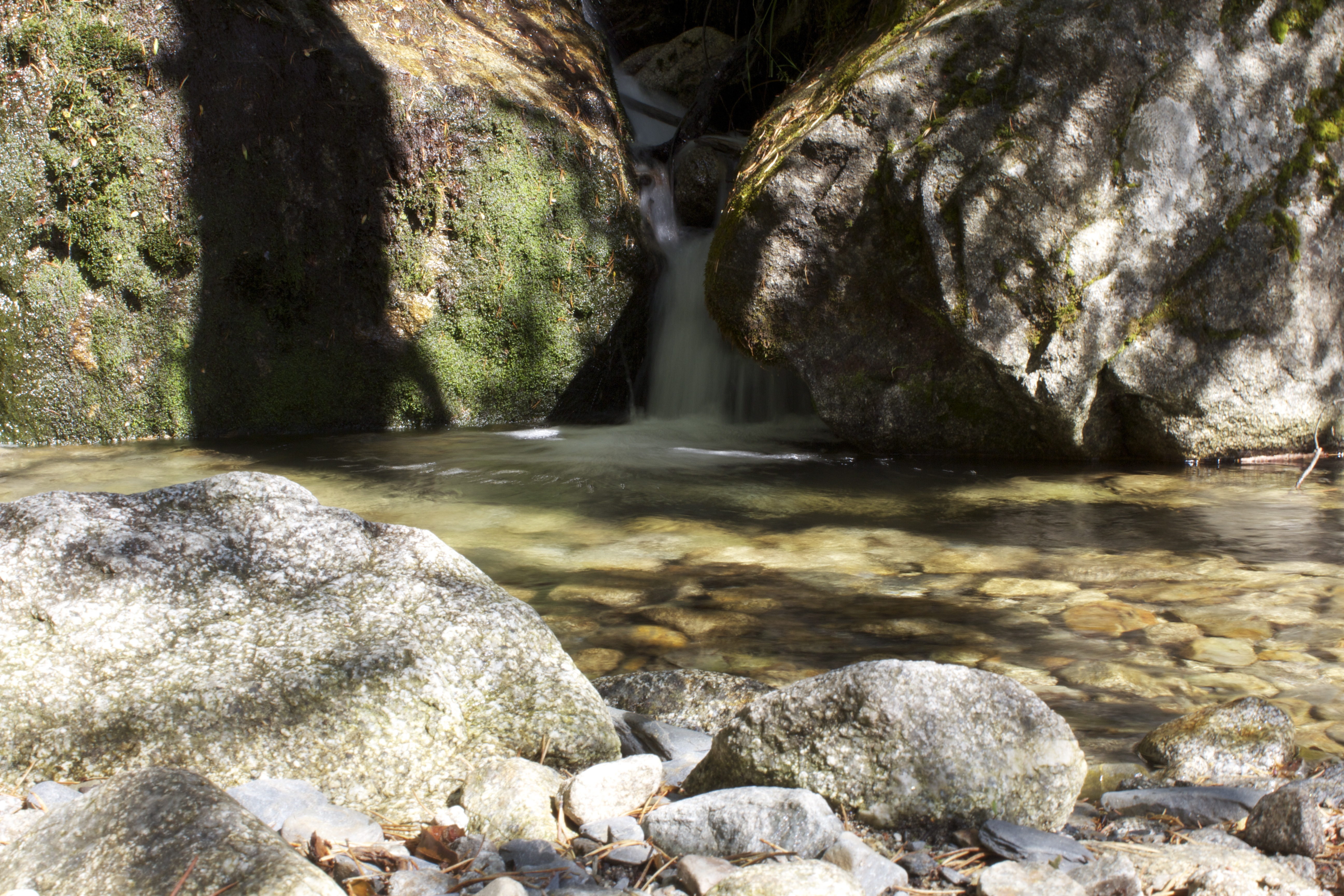 Riu d'Enclar This is a a photo of a river in Andorra with id: IEA-R-14